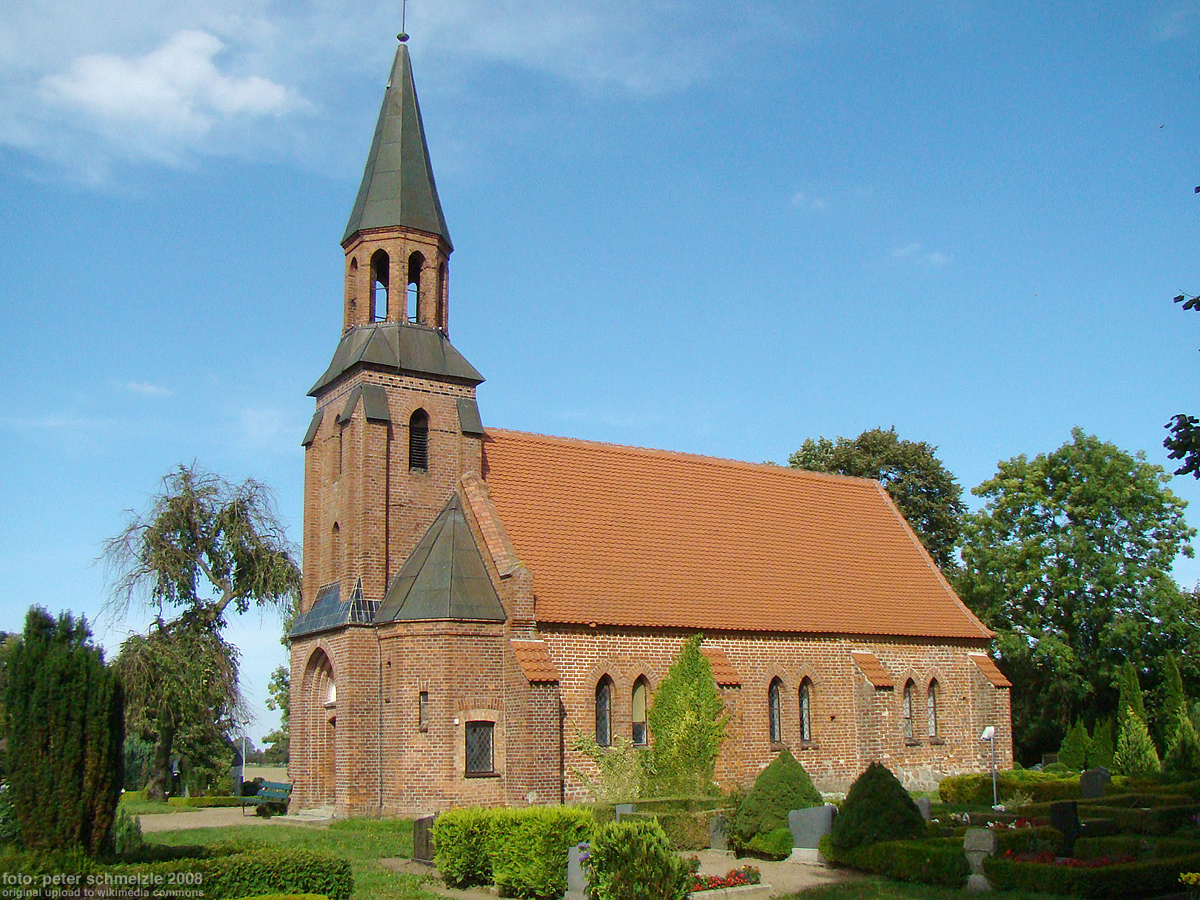 Kirche in Kirchdorf bei Grimmen